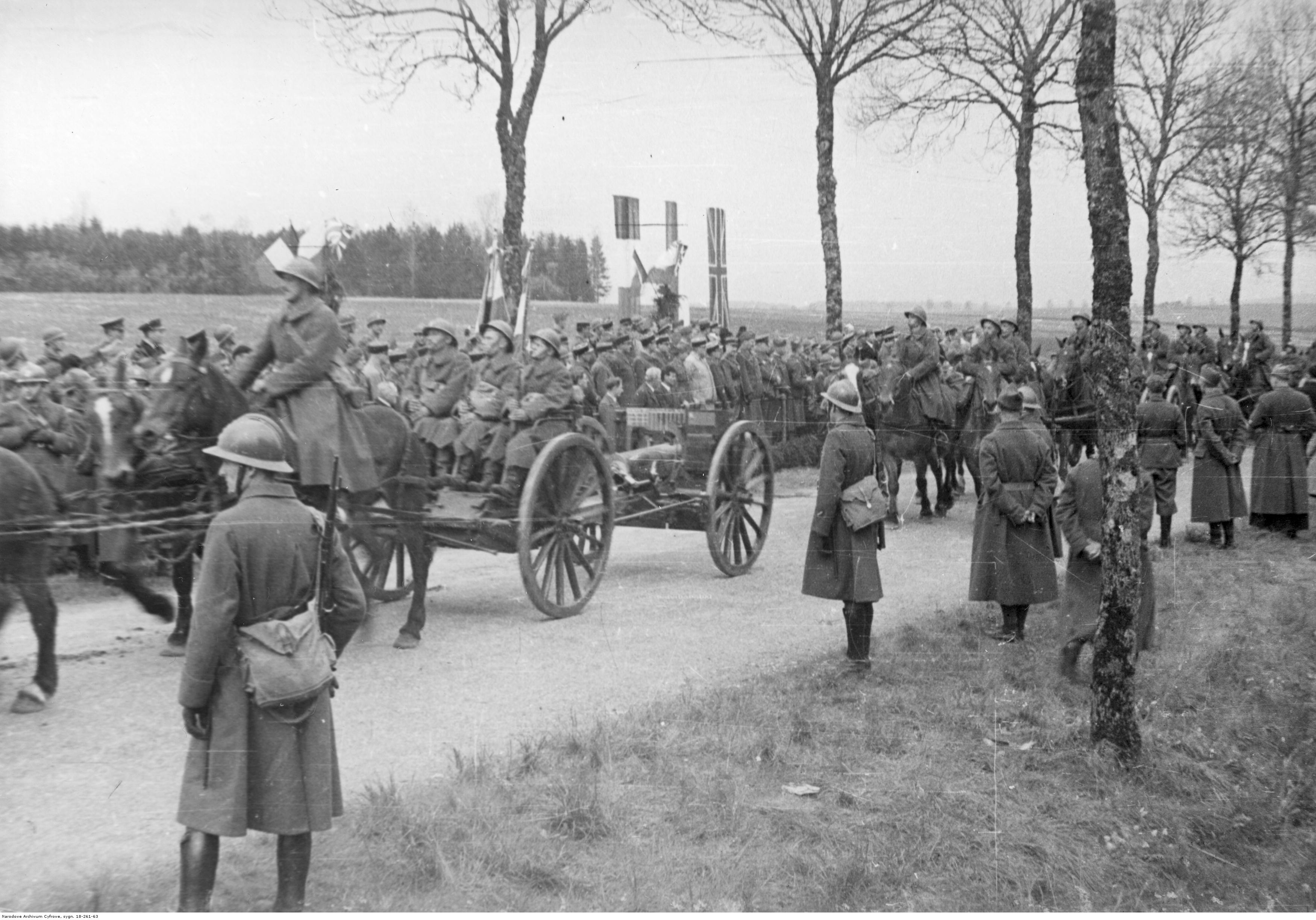 1 Dywizja Grenadierów Wojska Polskiego we Francji - obchody święta 3 Maja i uroczystość nadania miana Grenadierów odbywające się przy szosie Autreville-Martigny. Defiluje artyleria lekka - widoczny zaprzęg z 75 mm armatą polową Schneider wz. 1897. Archiwum Fotograficzne Czesława Datki. Sygnatura: 18-261-63